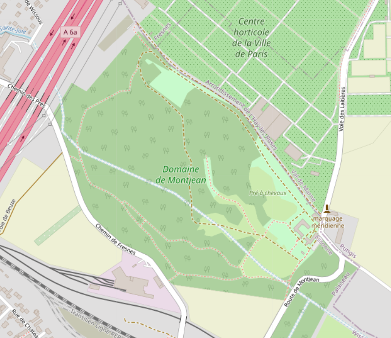 Carte OpenStreetMap (OSM) du Domaine de Montjean à Wissous, France. This map may be incomplete, and may contain errors. Don't rely solely on it for navigation.